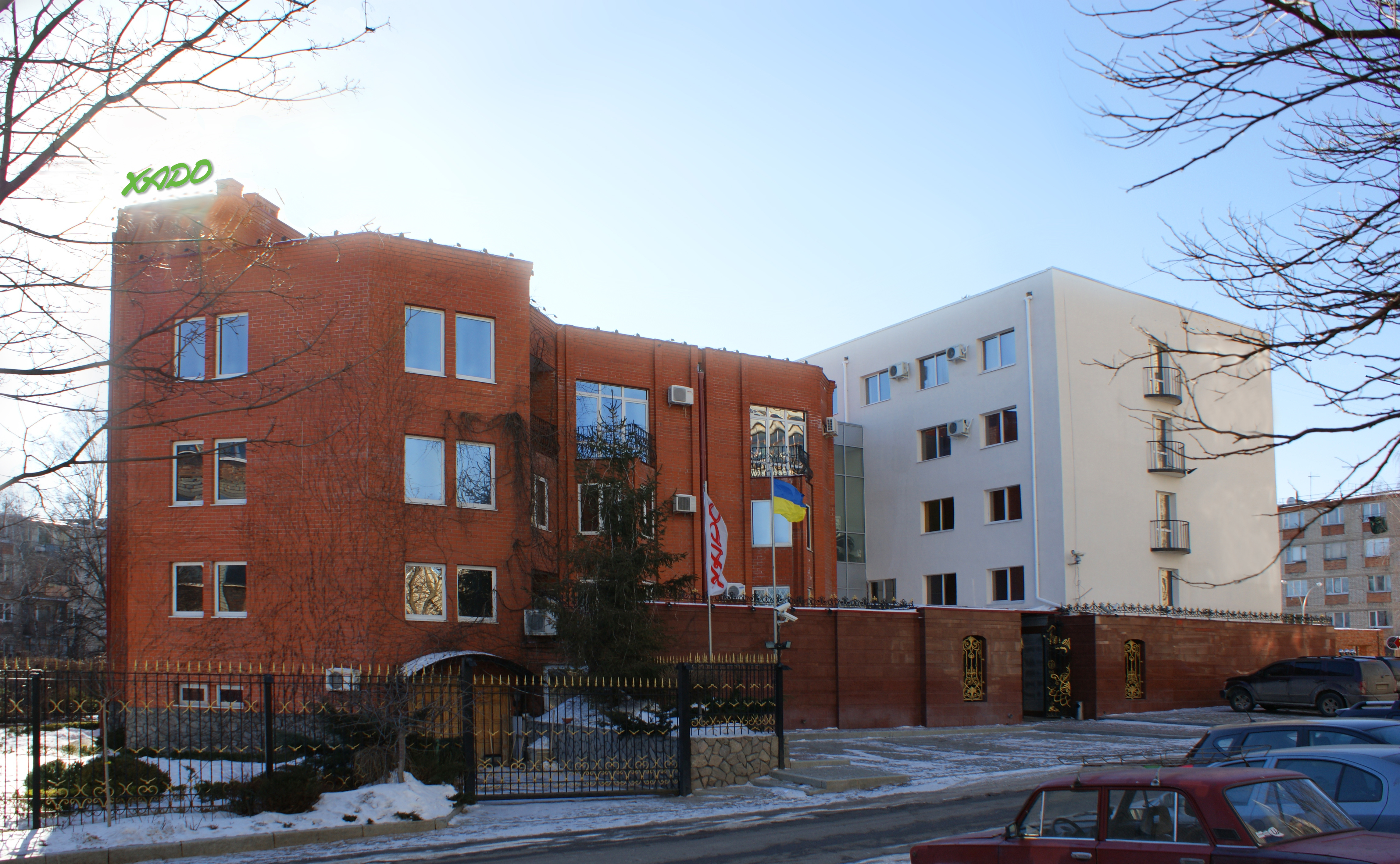 Офис ООО ХАДО, Харьков, Украина